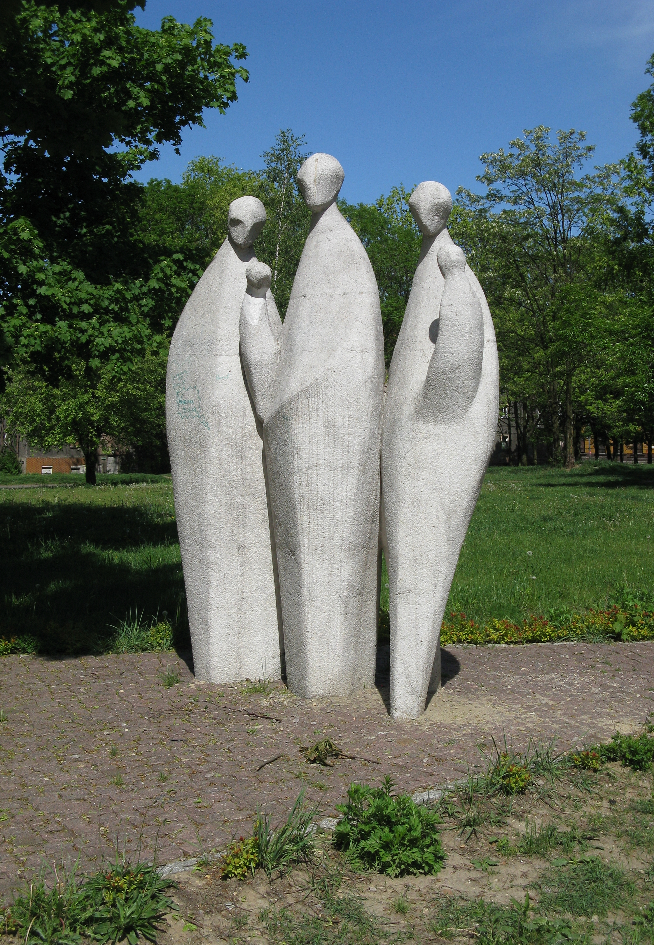 rzeźba „Rodzina” w Bytomiu-Rozbarku, park Szynol przy ulicy Jana Kochanowskiego, przeniesiona z Szombierek; autorzy: Egon Kwiatkowski i Waldemar Madej